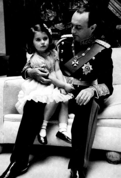 Српски (ћирилица): Кнез Павле Карађорђевић и принцеза Јелисавета